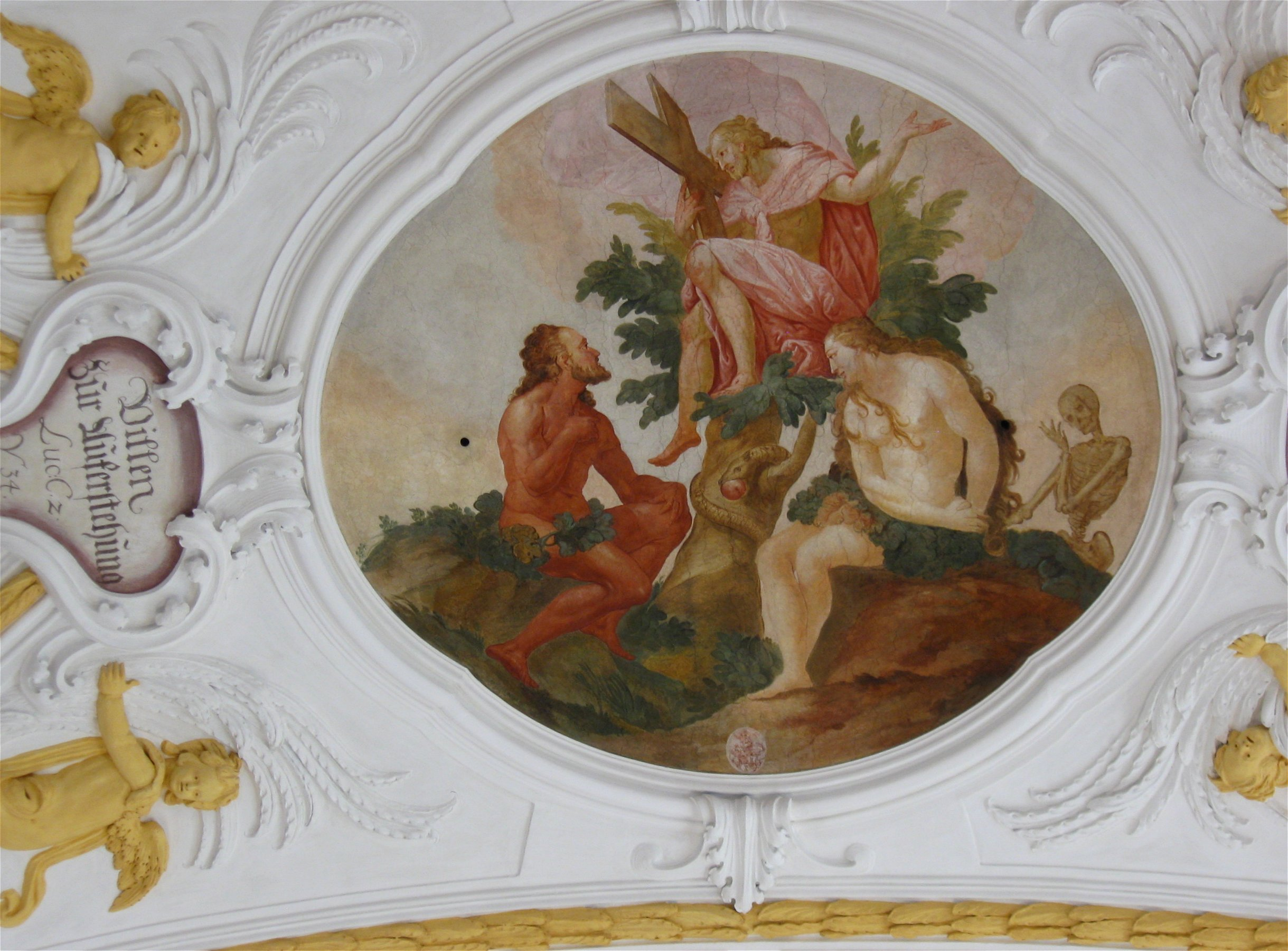 Plinganserstraße 1; Alte Sendlinger Kirche St. Margaret, 1711–12 von Wolfgang Zwerger. Deckengemälde.